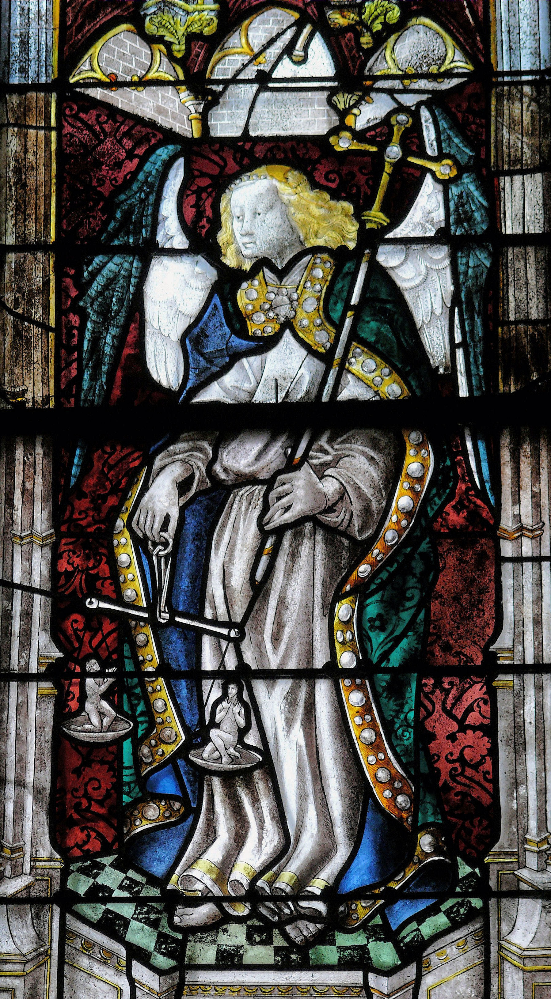 La Ferté-Bernard - Eglise Notre-Dame-des-Marais - Baie n°6 - Verrière de Saint-Michel (dernier tiers XVe siècle)